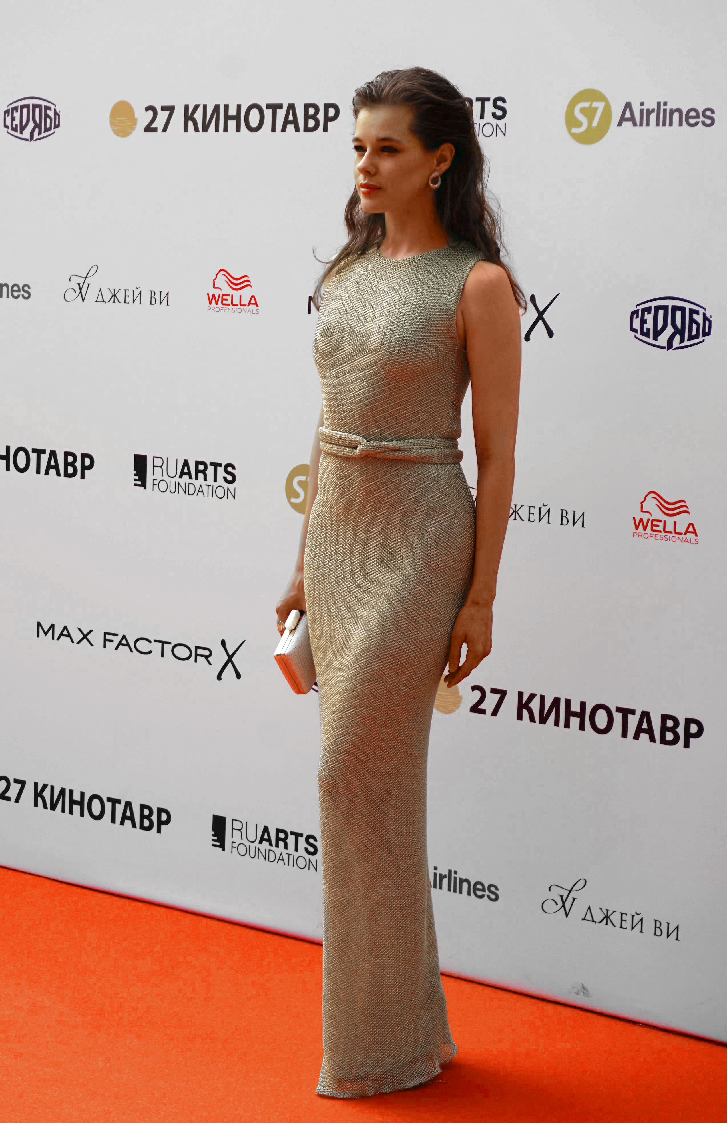 Екатерина Шпица на российском кинофестивале «Кинотавр» в Сочи, 2016